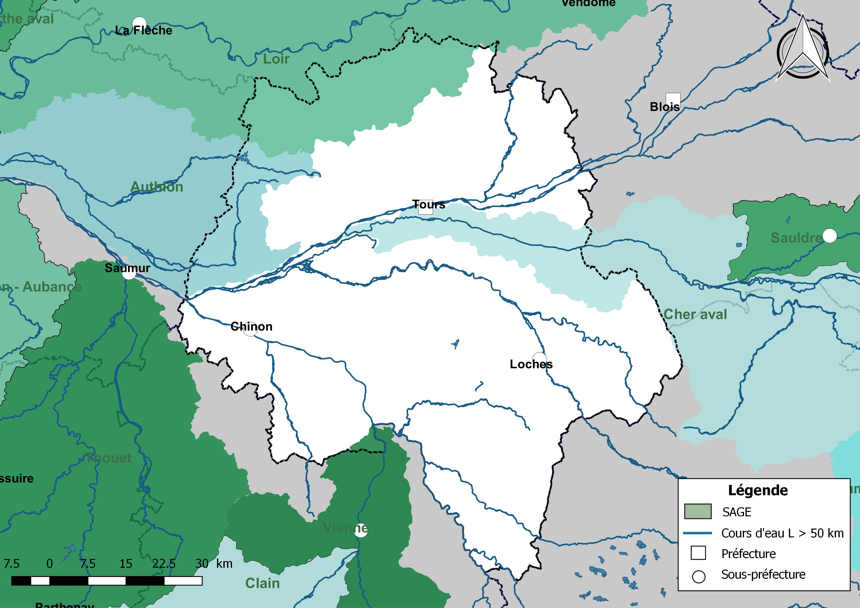 Carte des schémas d'aménagement et de gestion des eaux (SAGE) concernant le département d'Indre-et-Loire (France) au 1er janvier 2018.